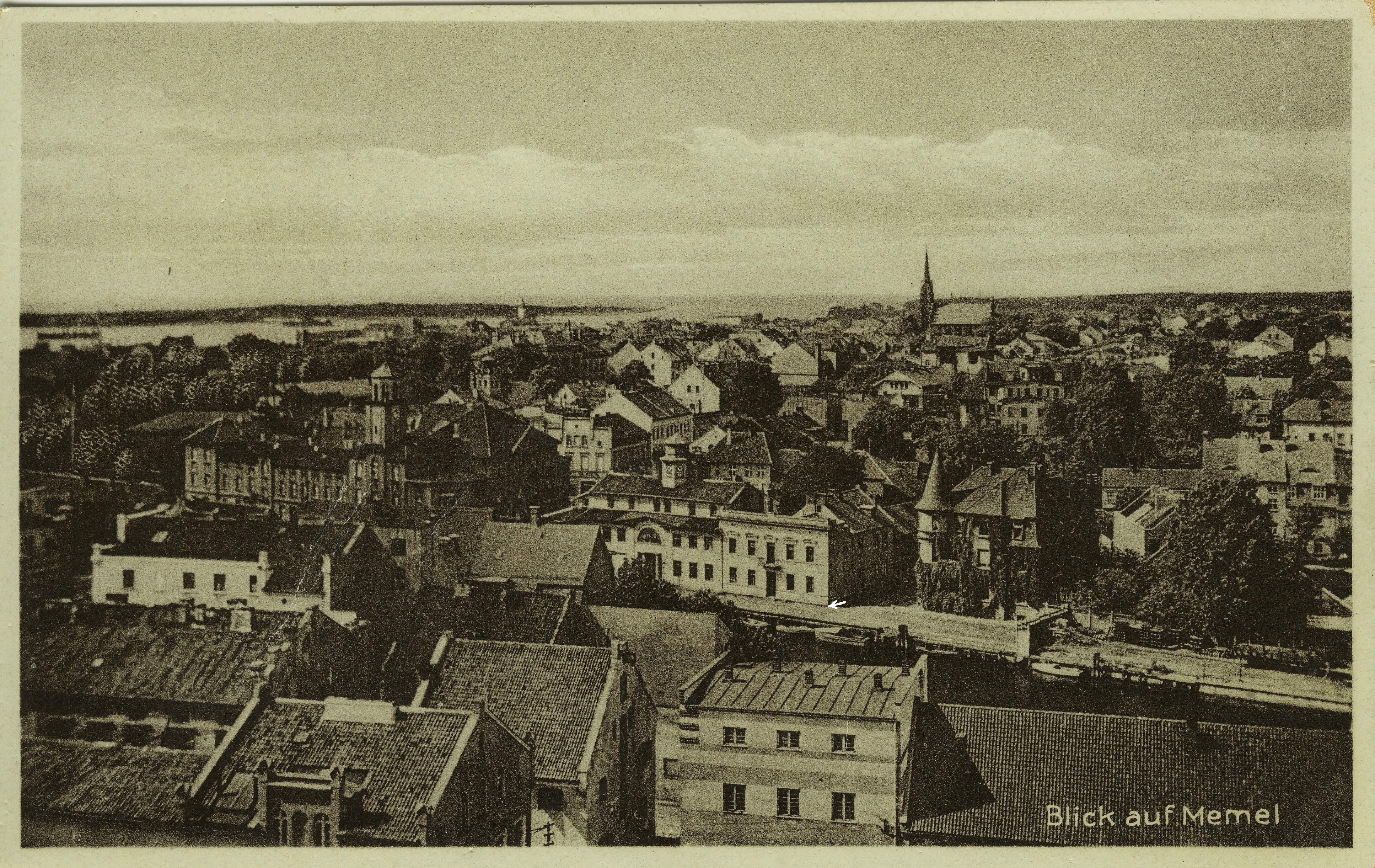 Pohled na Klaipėdu (tehdy Memel) z věže kostela Sv. Jana (zničeného při bombardování 28. ledna 1945). Souřadnice jsou na hrotu šipky na rohu již neexistujícího domu, který stál hned za mostem Biržos. V dáli je vidět vyústění Kuršského zálivu do Baltského moře. Pohled směrem k severozápadu